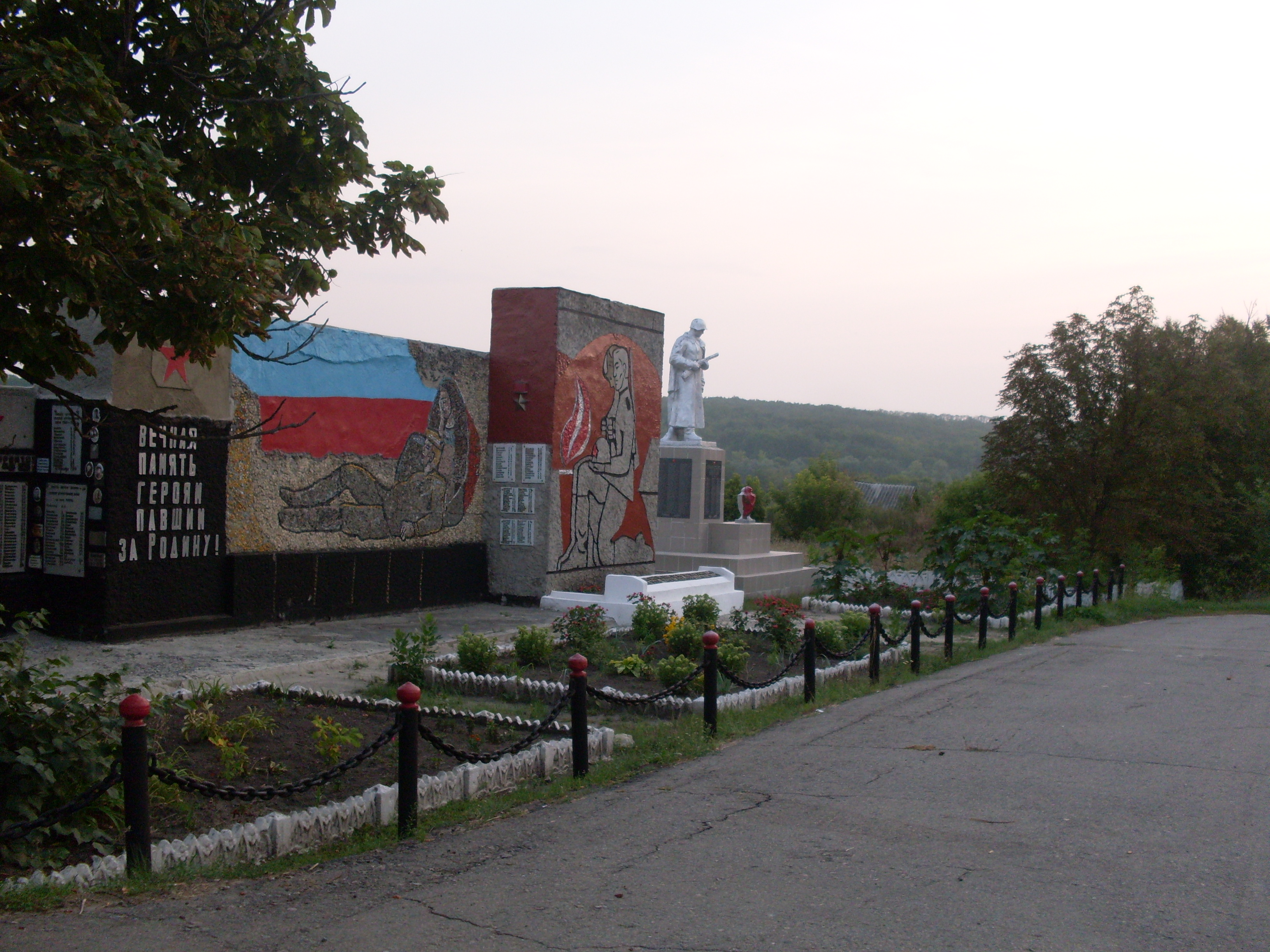 Пам'ятник воїнам - захисникам